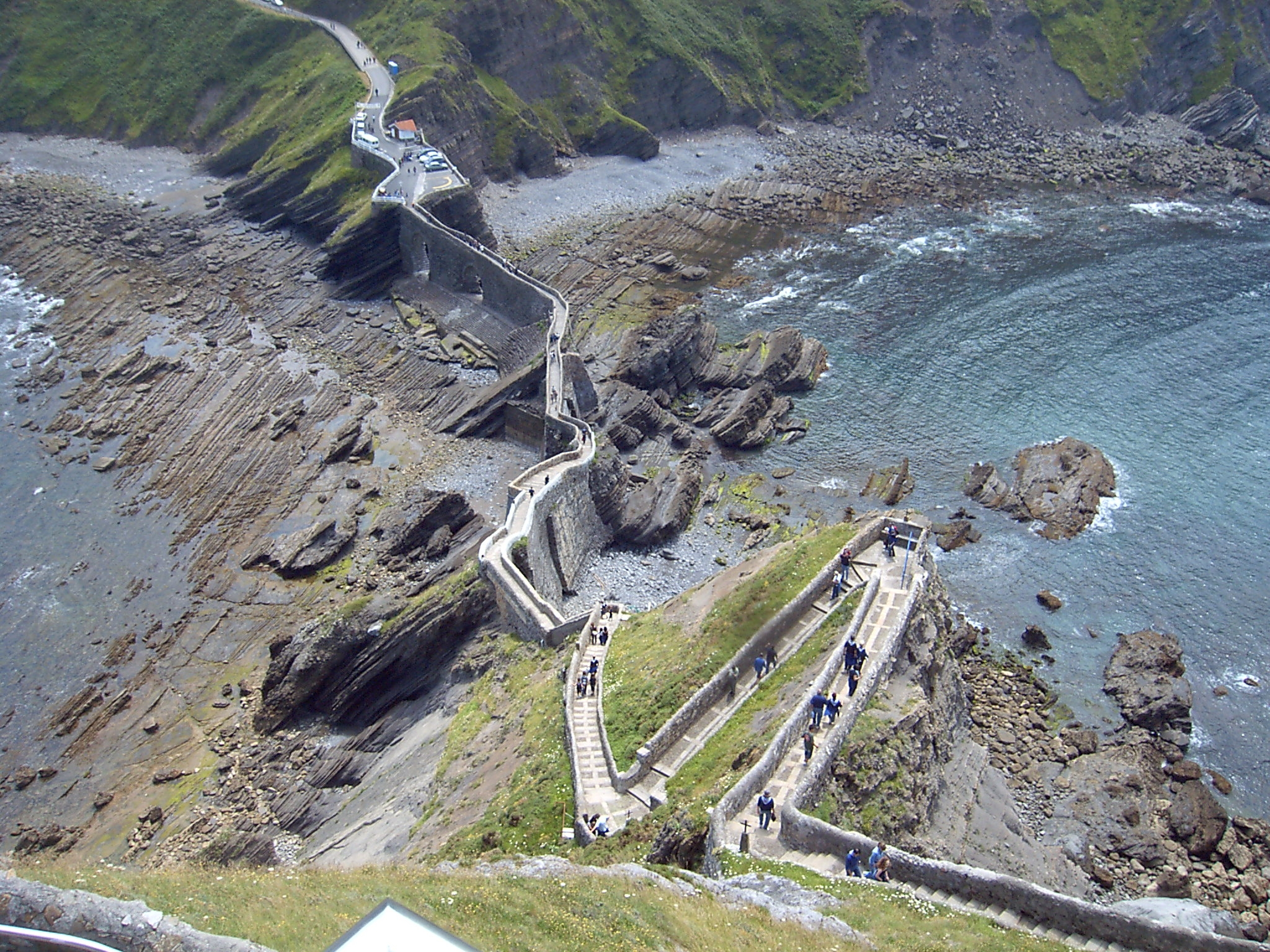 Gaztelugatxe doniene eskailarak